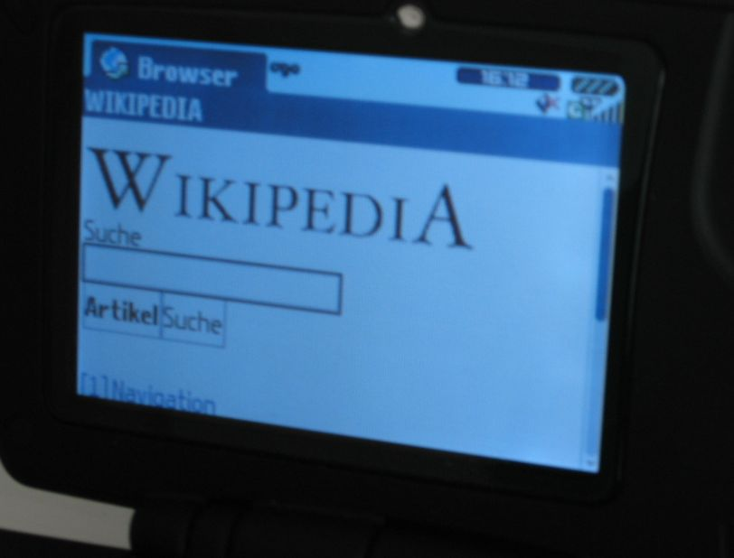 Wikipedia-Startseite von auf dem Ogo